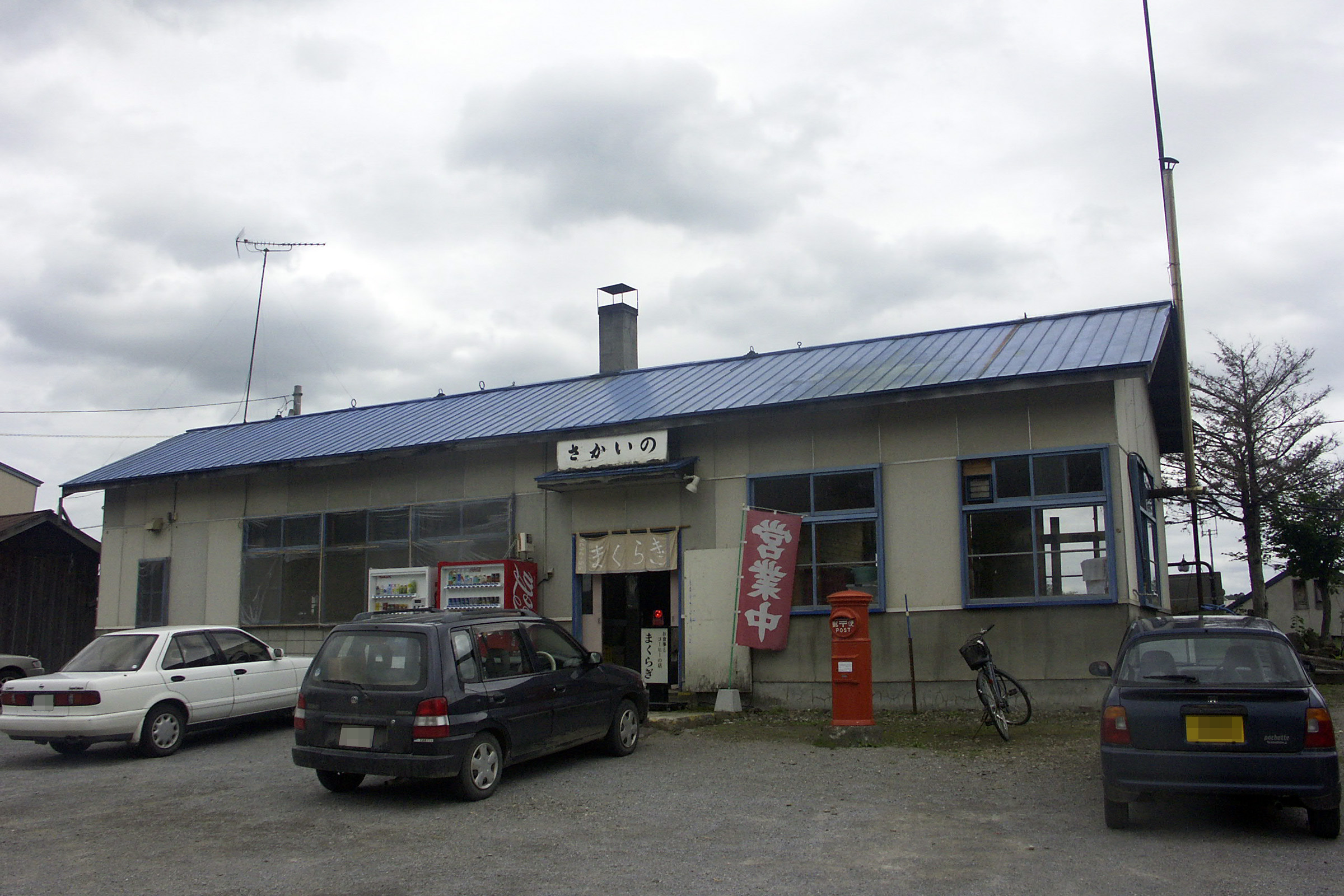 北海道ちほく高原鉄道ふるさと銀河線・境野駅